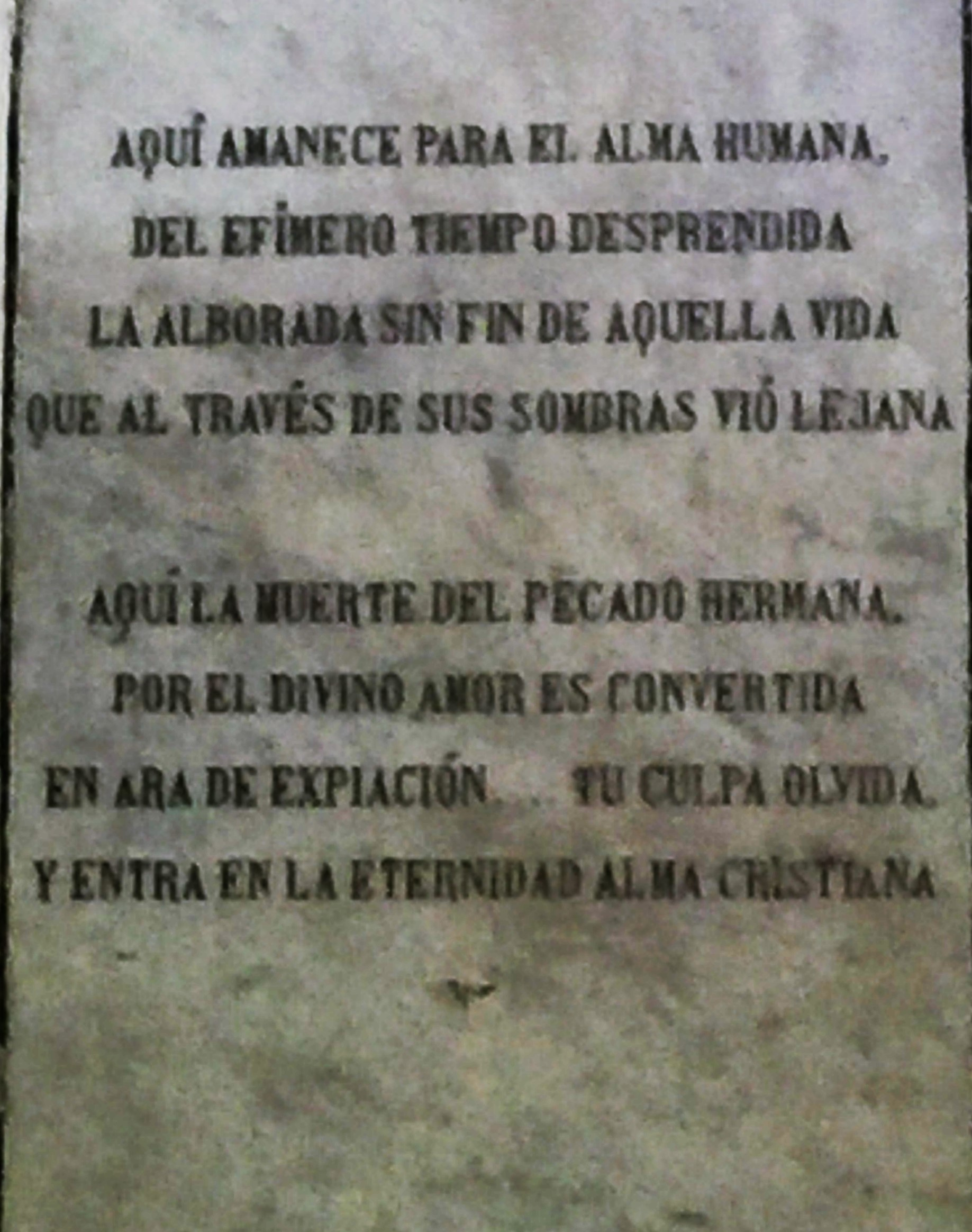 Poesía de Francisco Antonio Concha Castillo (1855-1927)